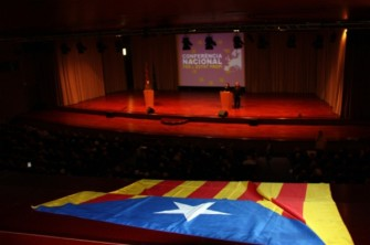 Inici de l'acte